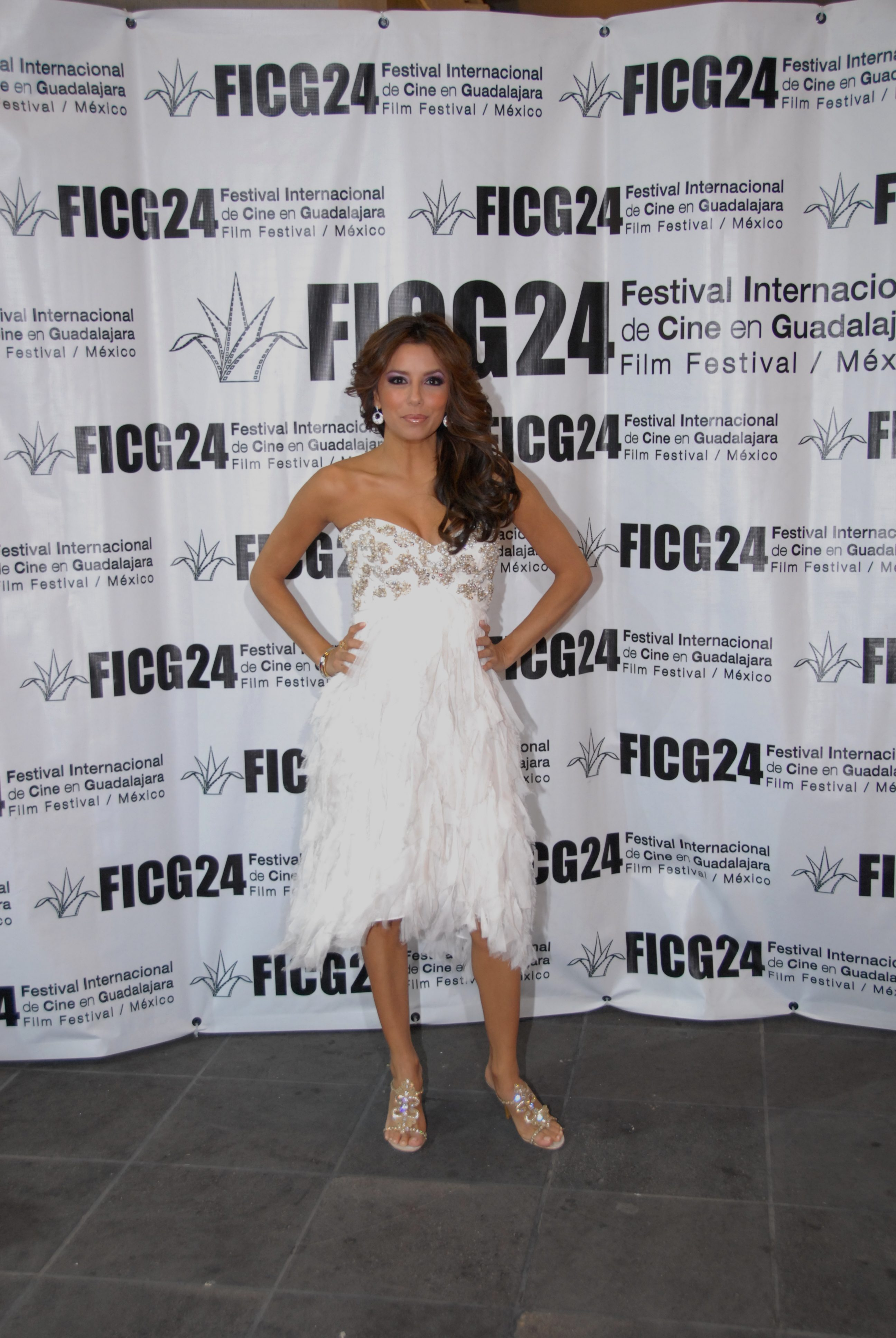 21/03/09 La actriz Eva Longoria en la alfombra roja previa a la proyección de la pelicula The Perfect Game, 20/03/09 La actriz Eva Longoria en la alfombra roja previa a la proyección d ela película The Perfect Game